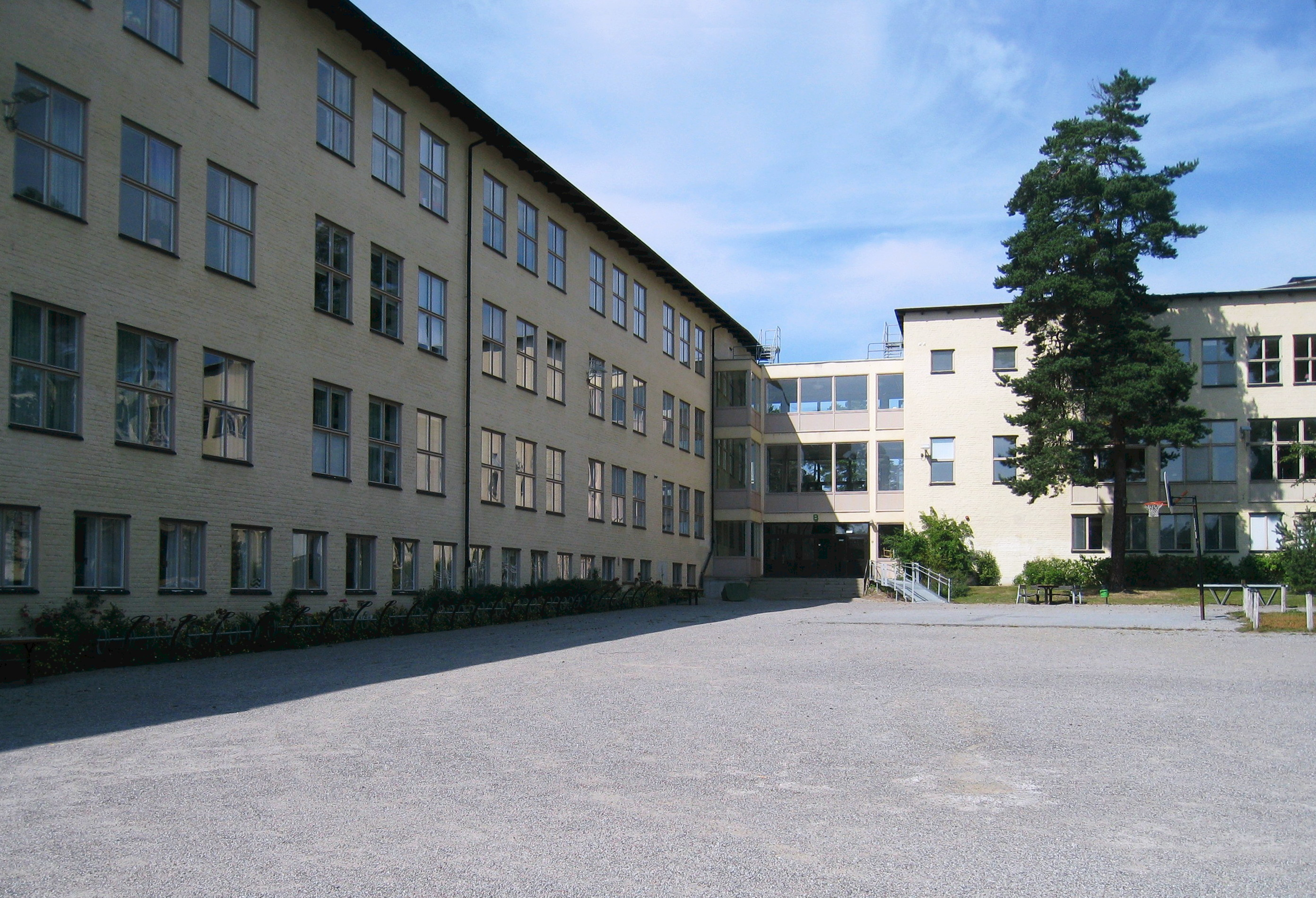 Äppelviksskolan, Alviksvägen 97, Bromma. En folkskola byggdes 1924 vid Alviksvägen där barnen från Äppelviken fick dela skola med smedslättsbarnen. En ny och större skola byggdes 1941-1942. Arkitekter var Paul Hedqvist och Stig Ödeen.